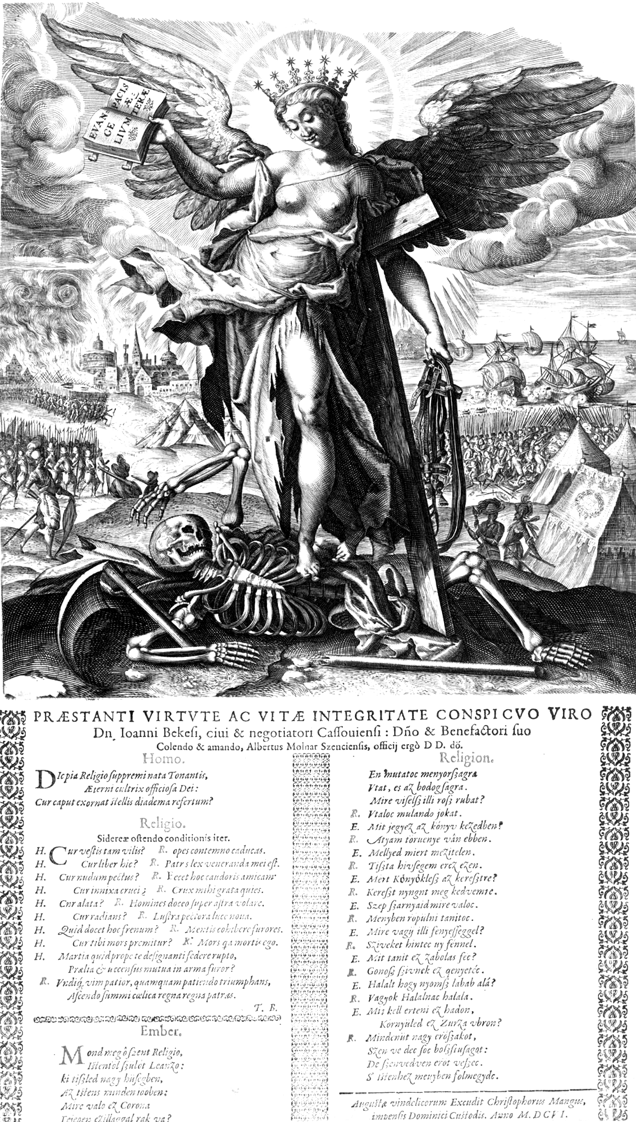 A metszeten a Religiót (Vallás) szárnyas nőalak személyesíti meg csillagkoronával, dicsfénnyel, rongyos ruhában, amint egyik lábával rá tapos a csontvázként, kettétört kaszával ábrázolt, sírban fekvő Halálra. A Religio fakeresztre támaszkodik, jobb kezében nyitott könyvet tart. A könyvön az „Evangelium pacis aeternae” (Az örök béke evangéliuma) szöveg olvasható. Bal kezében üres kantárszár van. A háttérben csatatér látható holland és spanyol katonákkal, akik úgynevezett Morion típusú sisakot viselnek, előttük spanyol címerekkel díszített sátortábor és lövöldöző holland hajók, mögöttük keletinekkinéző, égő város. A kép alá nyomtatták a Homo (Ember) és a Religio (Vallás) között kérdés-felelet formában zajló párbeszédet latinul, majd magyar fordítása. A fordító, Albertus Molnar Szenciensis ajánlása Iohannes Bekesinek, vagyis Békési Jánosnak, Kassa város polgárának és tanácsosának szól. (a párbeszéd kedvelt műfaj volt a kora újkorban)